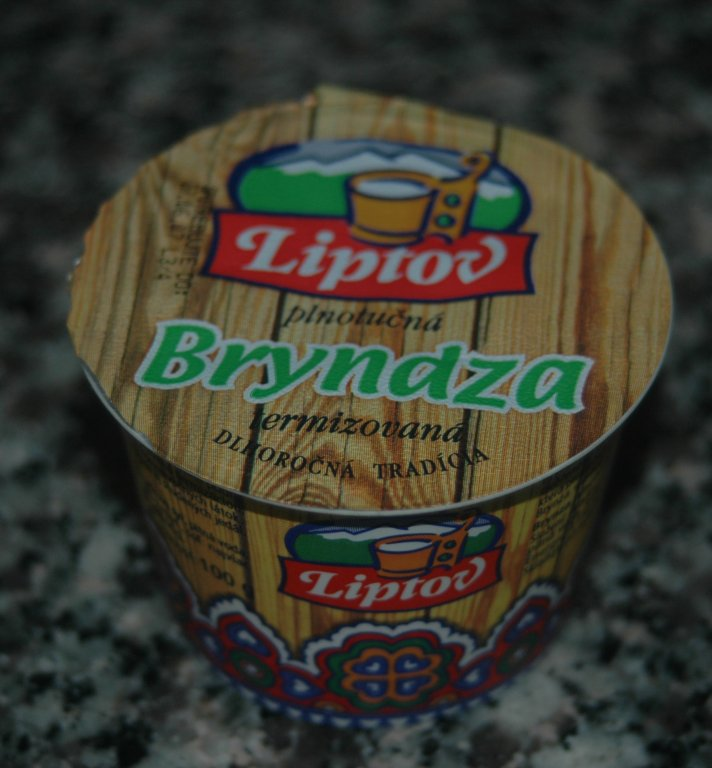 Slovak sandwich bryndza